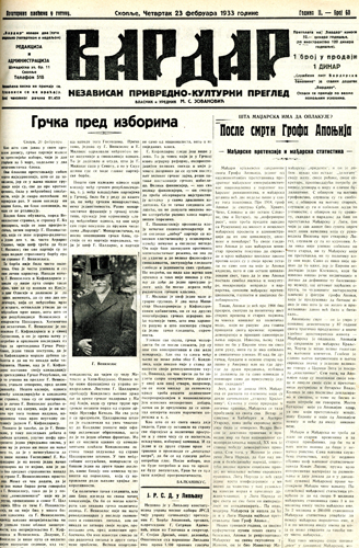 Брой на вестник Вардар.